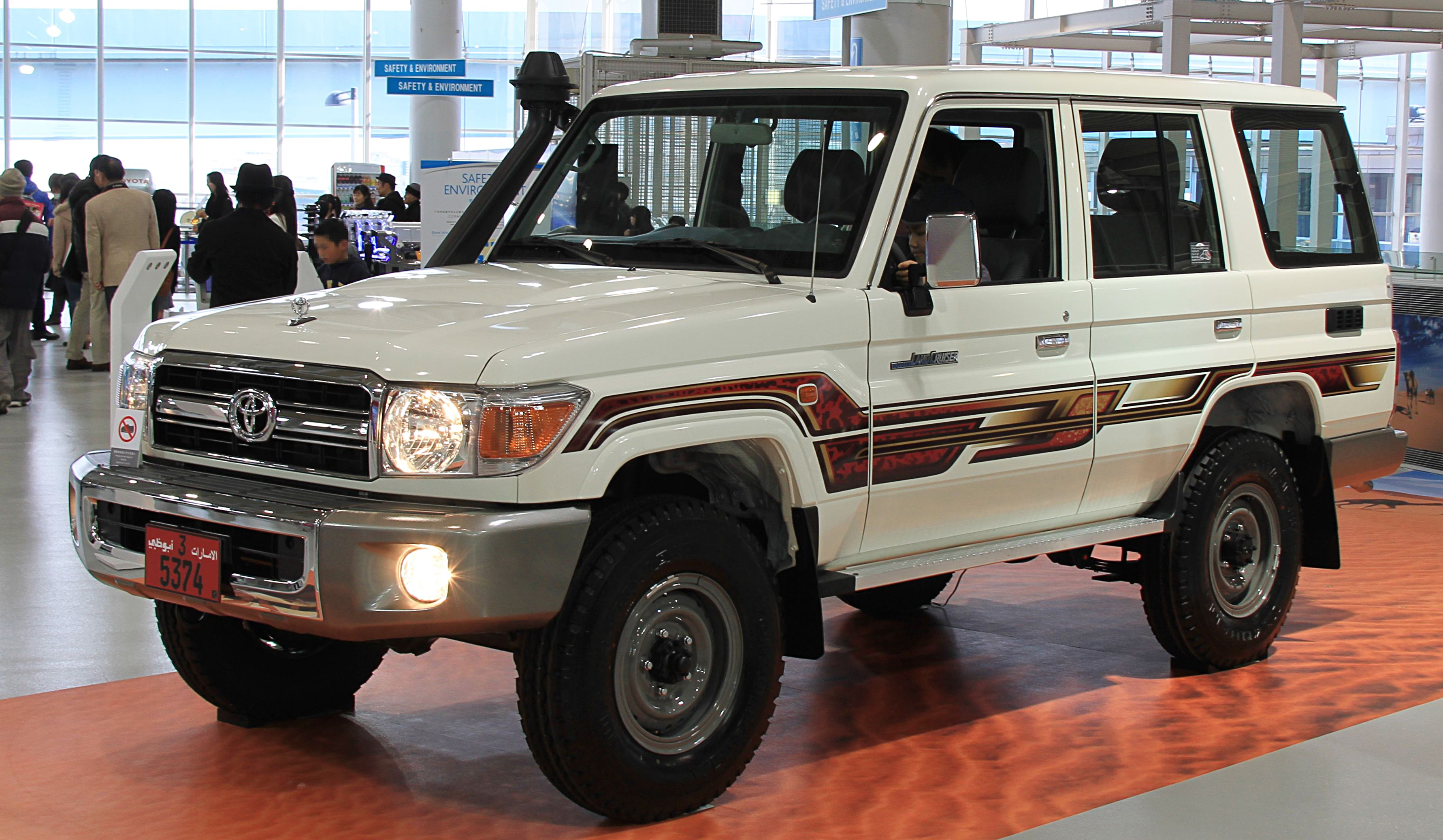 Toyota Land Cruiser 70